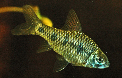 Puntius sahyadriensis